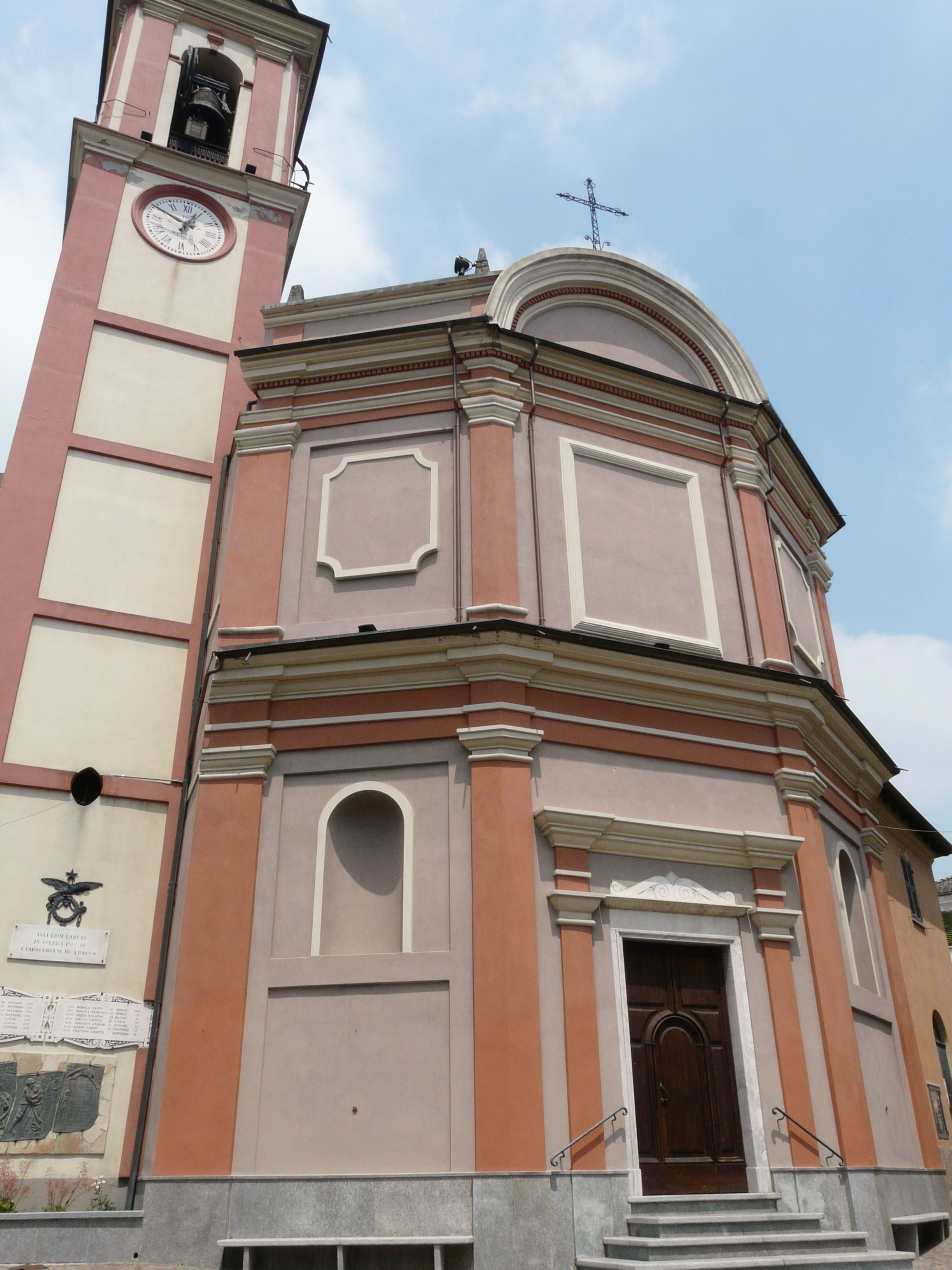 Chiesa dei Santi Rocco e Sebastiano, Parodi Ligure, Piemonte, Italia